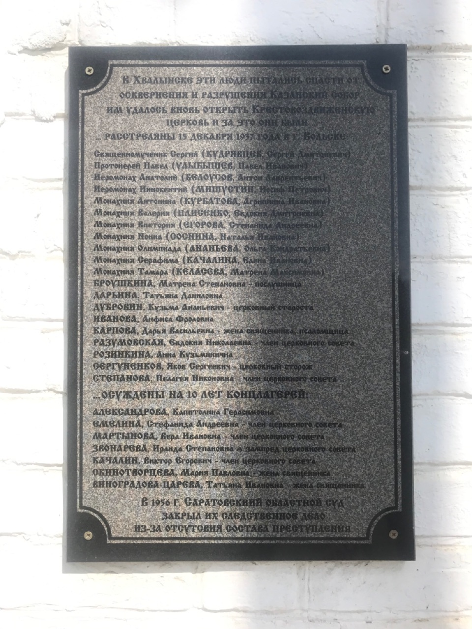 Создана Фондом сохранения и развития историко-культурного наследия Хвалынского района «Сосновый остров»